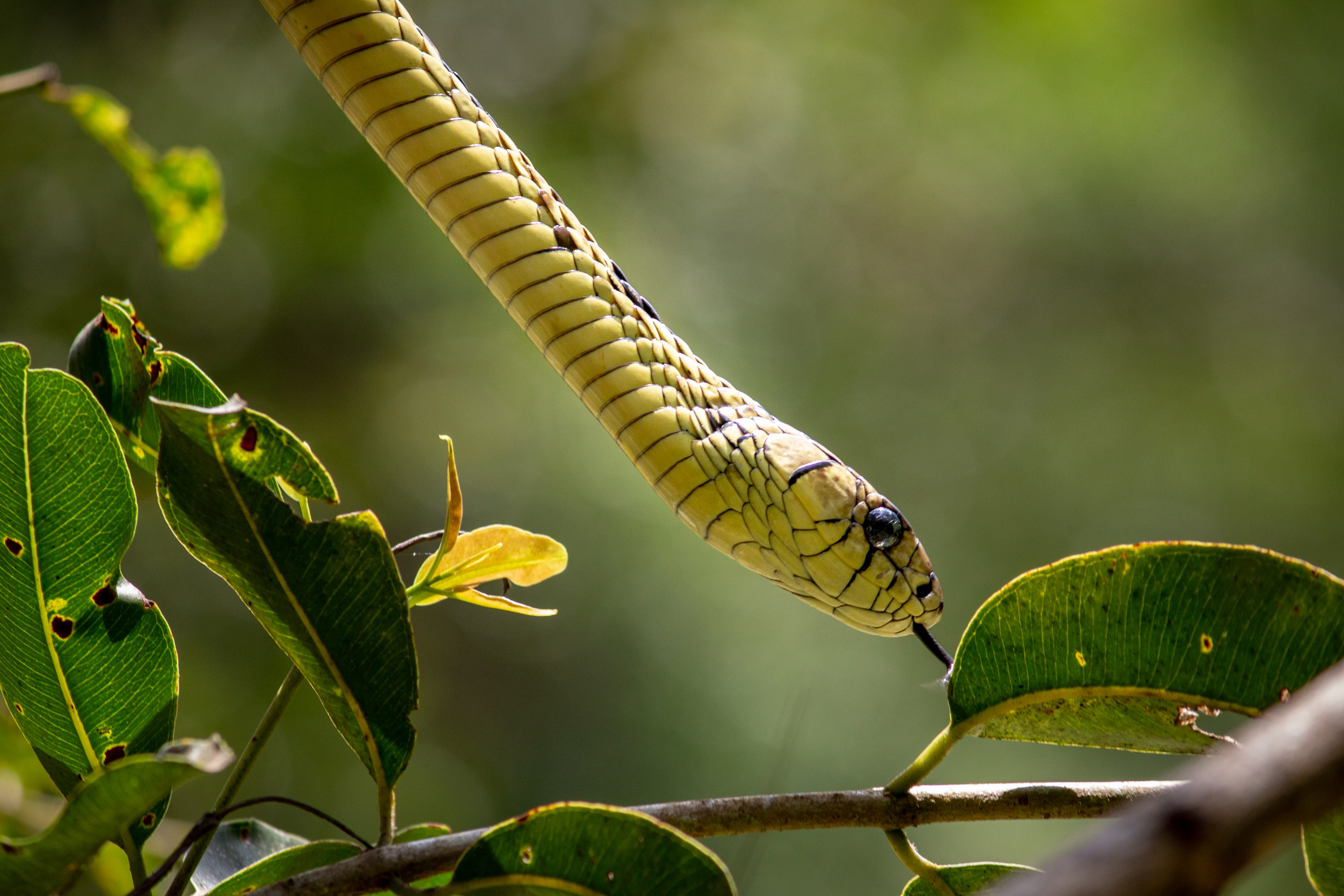 Spilotes pullatus por Luan Alves Chaves- Expedição PETAR 2020